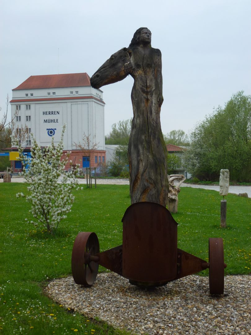 Holzskulptur von Michael Patzer an der Herrenmühle in Weißenfels